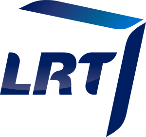 Logo LRT